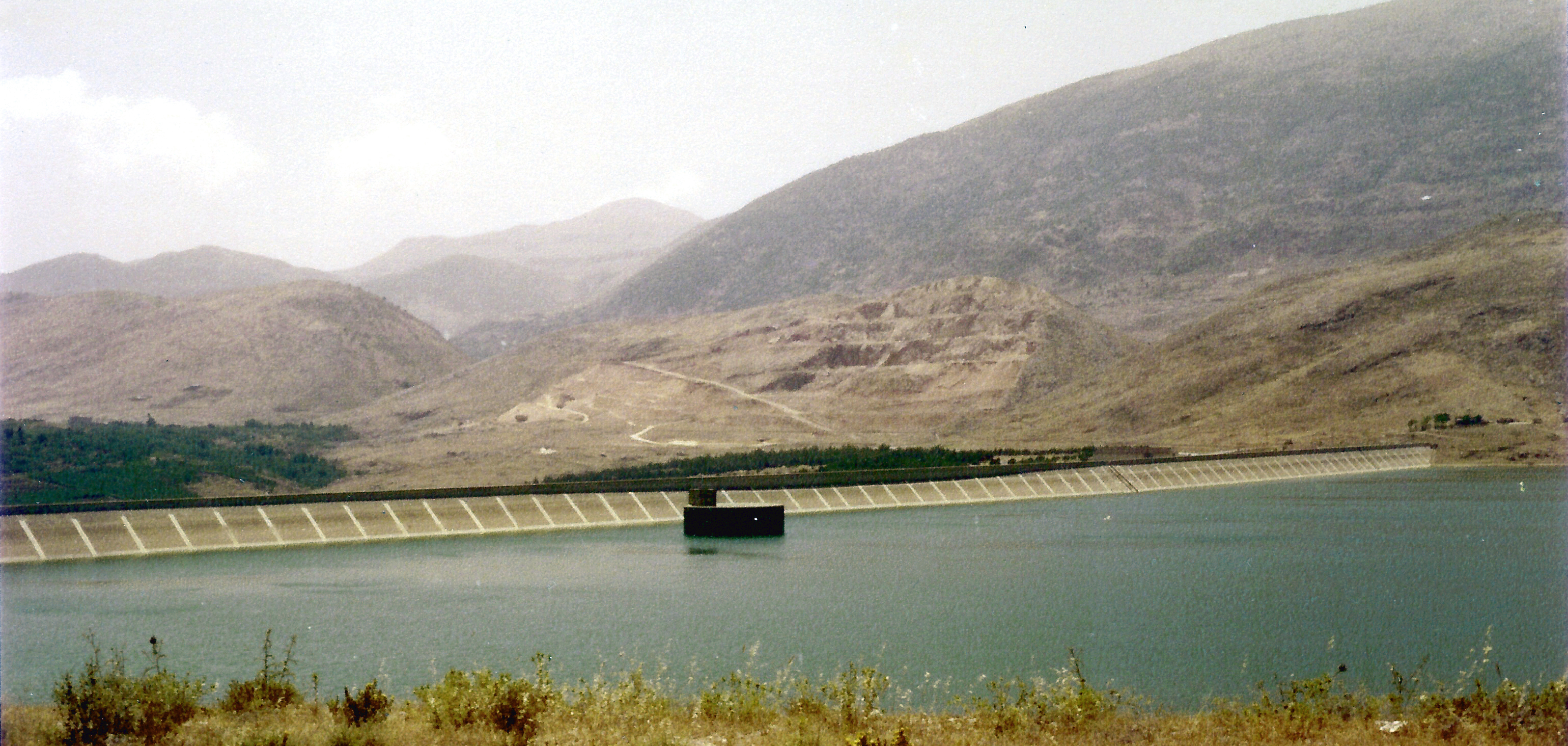 Lake Qaraoun, Lebanon